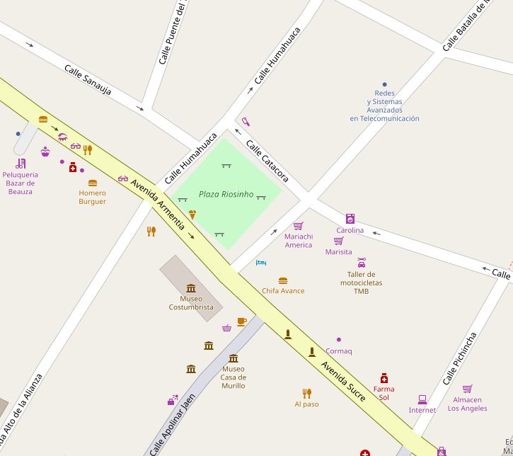 Mapa en OpenStreetMap, Plaza Riosinho, La Paz